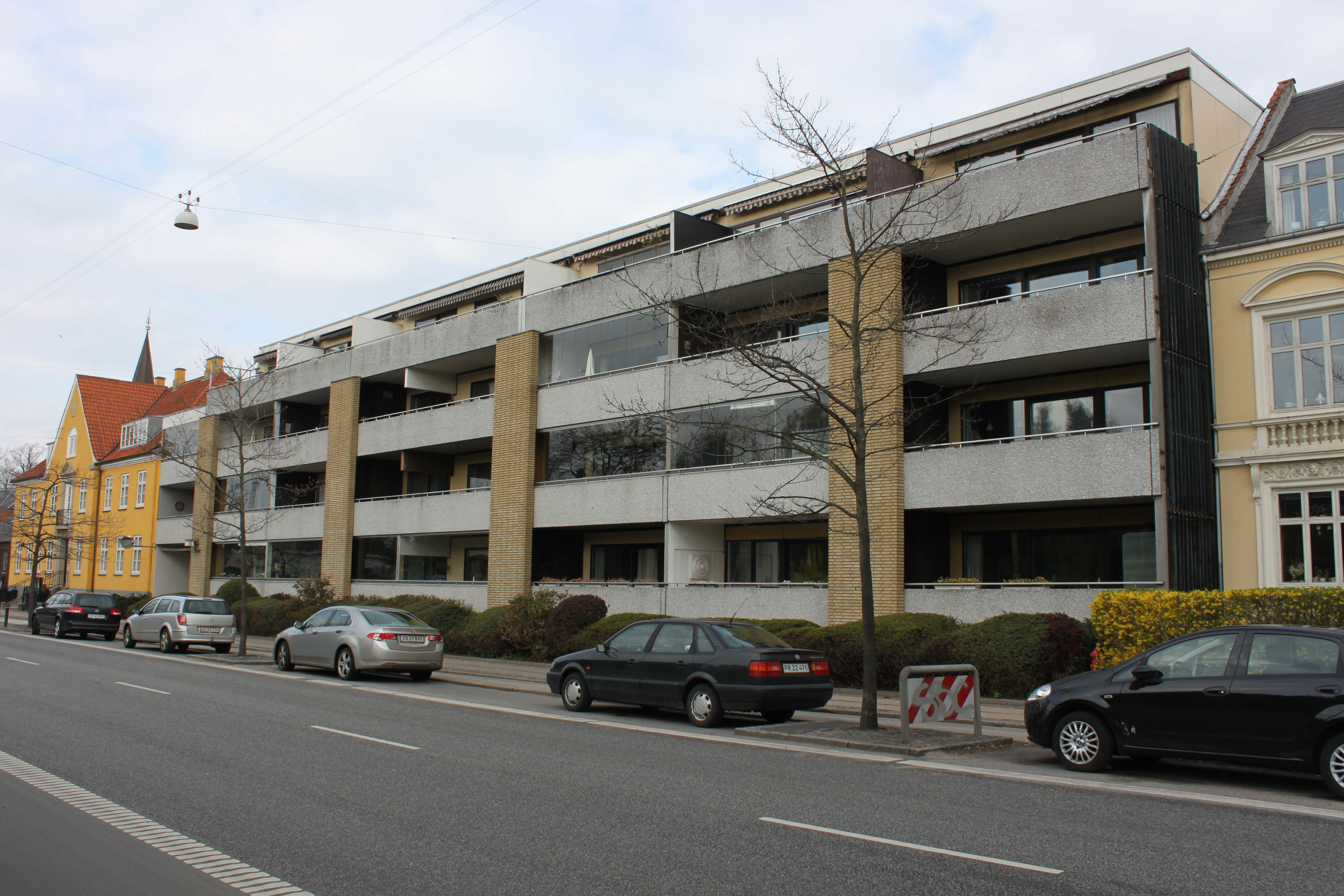 Slotsgården, Pile Allé 5, DK-2000 Frederiksberg, Denmark. Build 1975. Architect Svend Fournais.